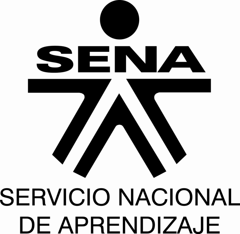 Logo oficial del Servicio Nacional de Aprendizaje SENA